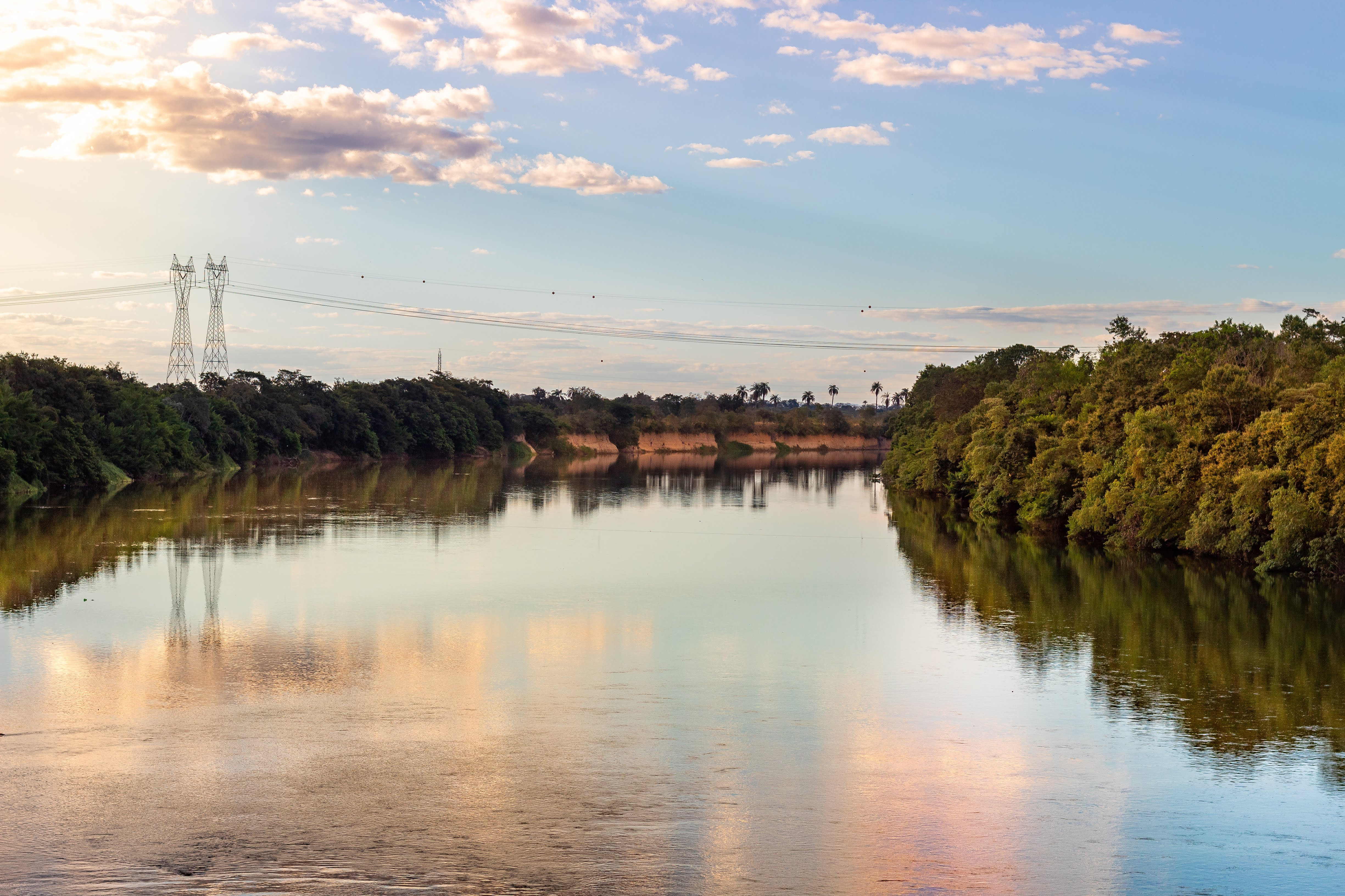 Rio das Velhas localizado em Várzea da Palma MG